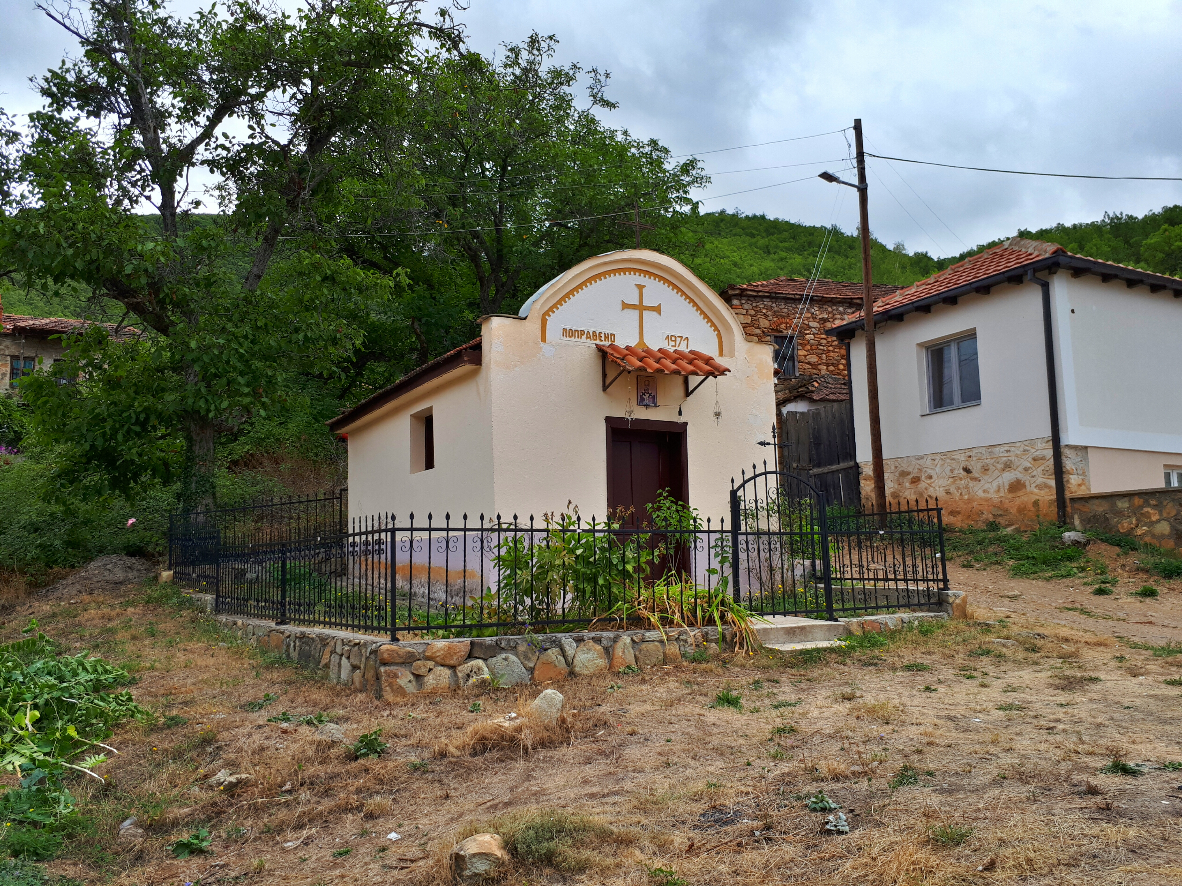 Група Архитектура на вториот ден на Викикамп Брајчино 2017